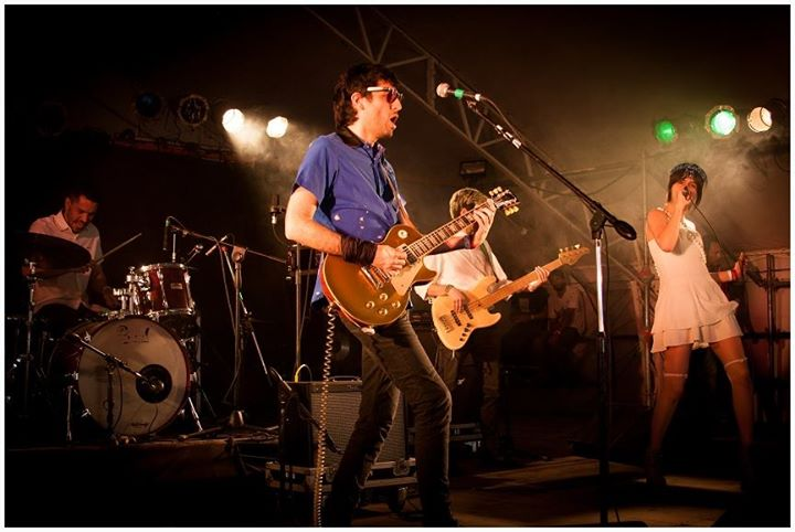 Gonzalo Aloras en vivo